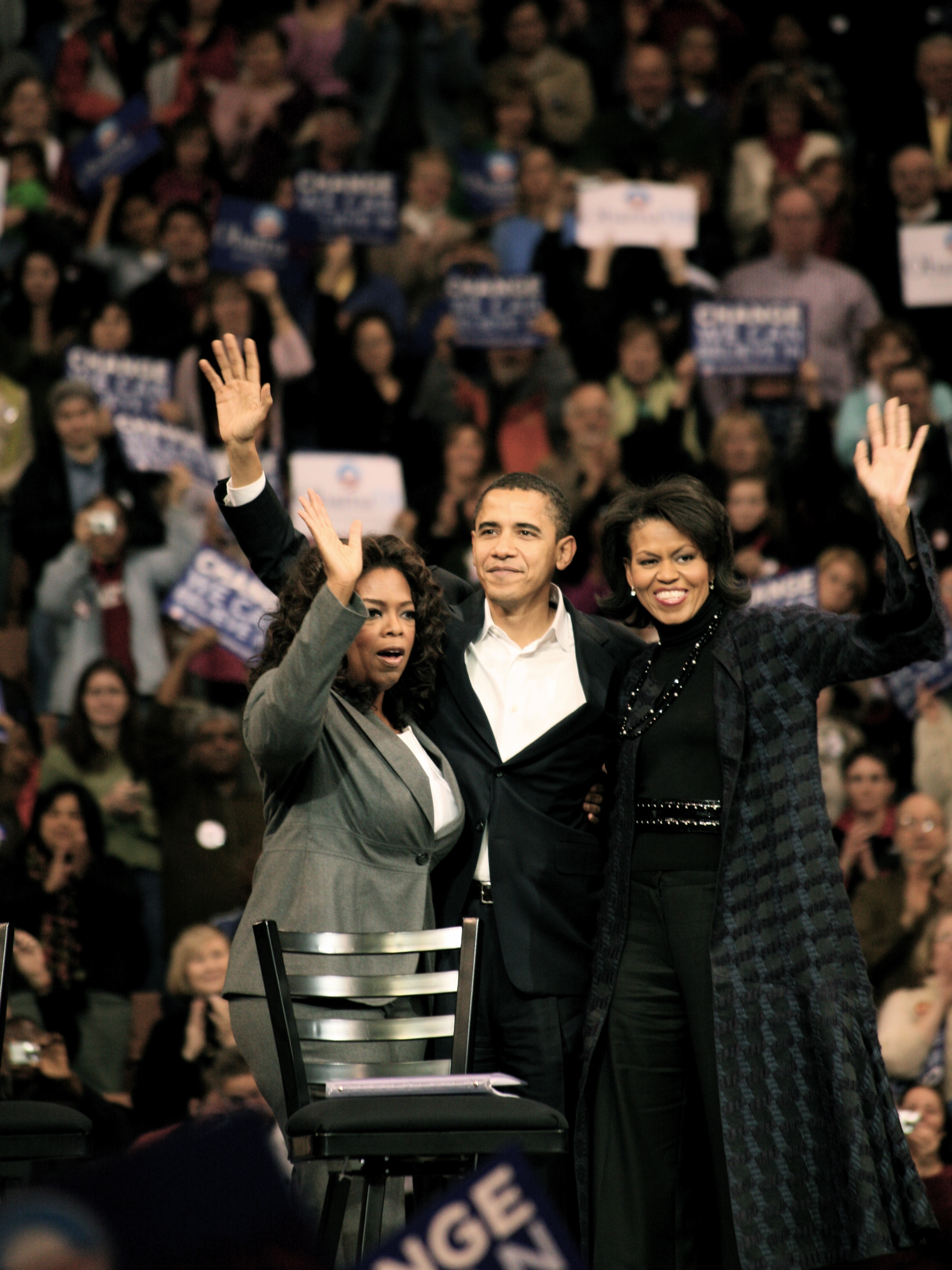 Oprah Winfrey, Barack Obama & Michelle Obama